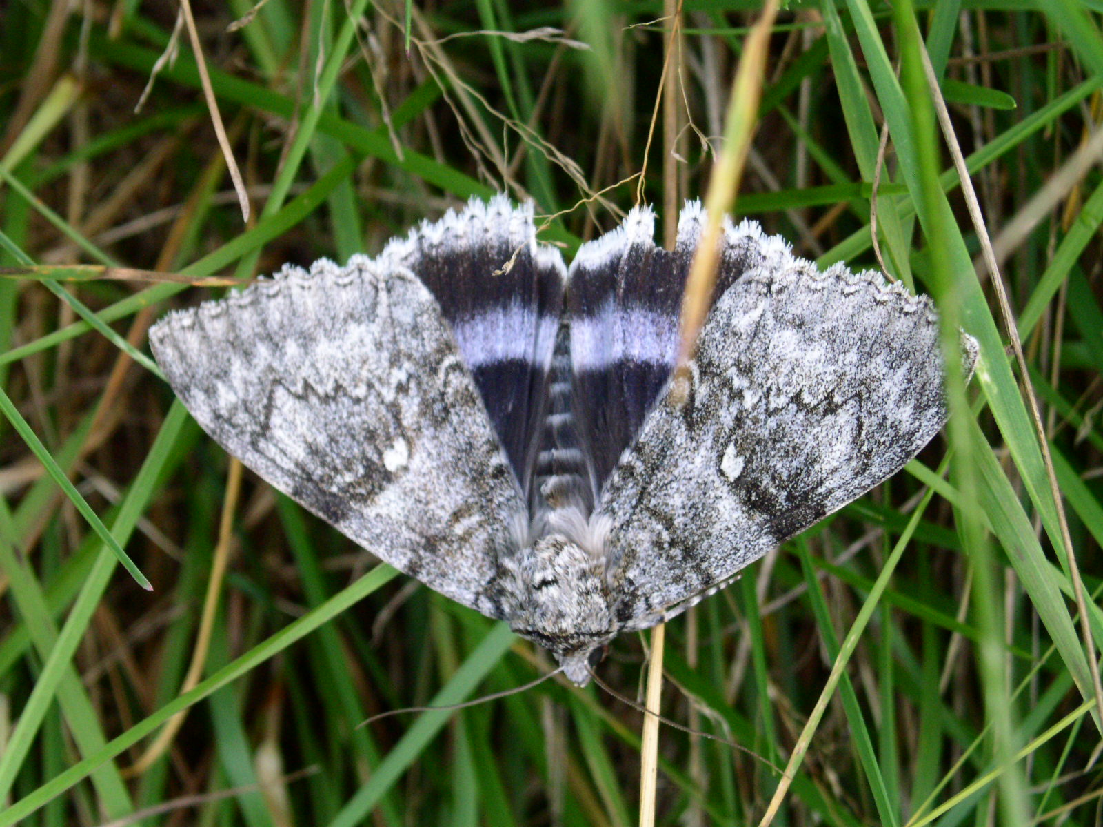 Blåbandat ordensfly, Catocala fraxini, vid Flodavallen idrottsplats, Gagnefs kommun, Dalarna